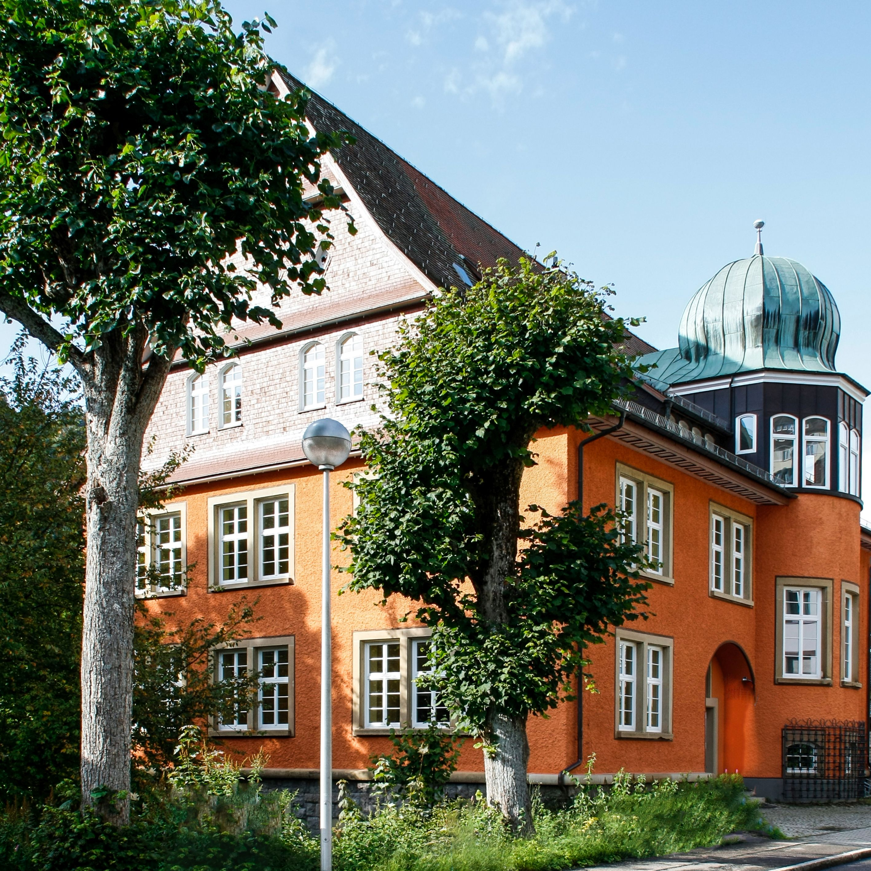 Altbau des Schwarzwald-Gymnasiums in Triberg im Schwarzwald